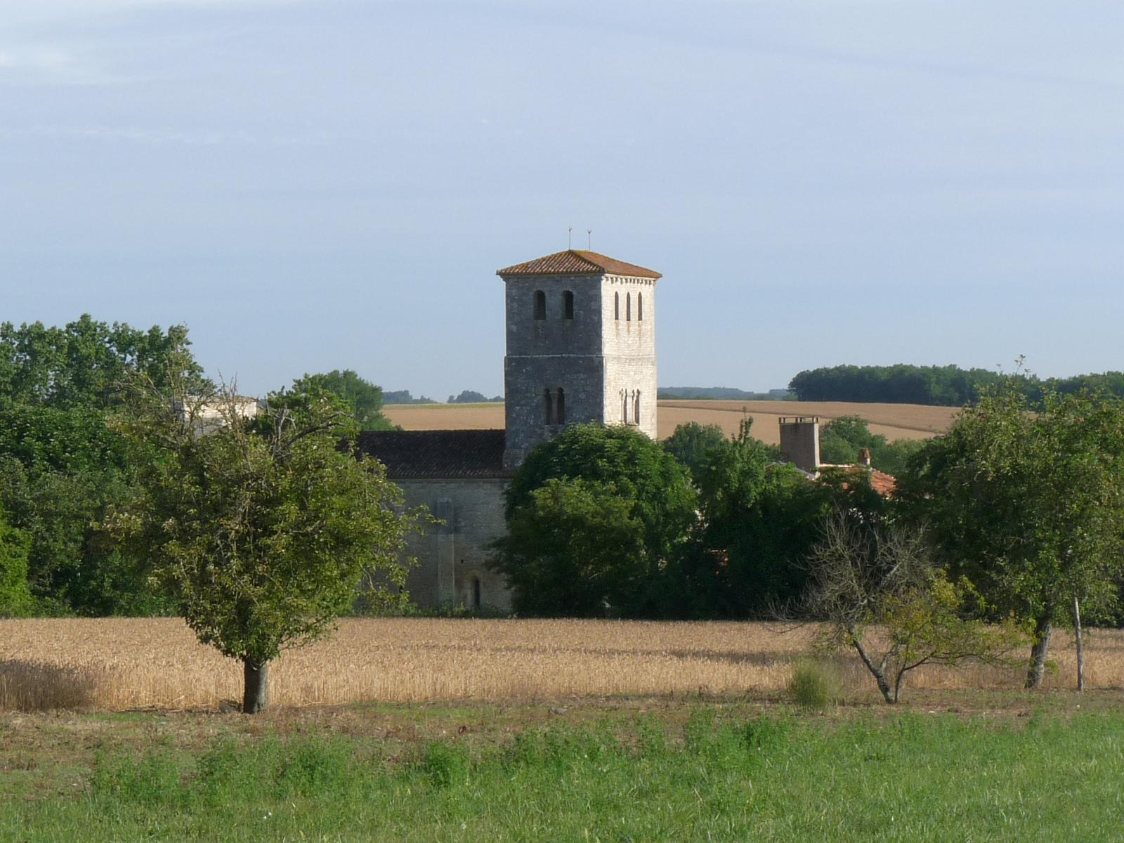 église de Coulgens, Charente, France